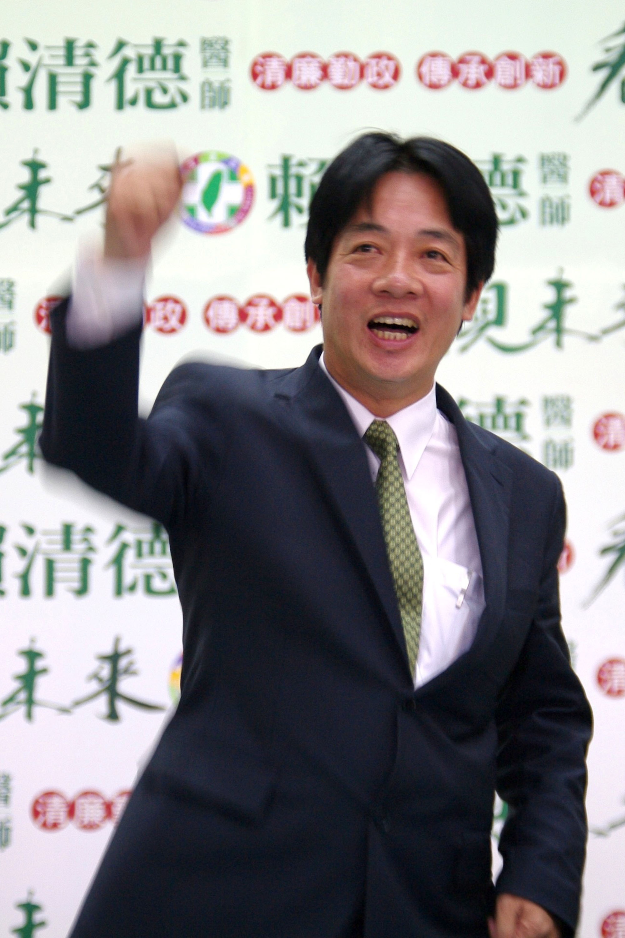 中文（台灣）: 拍攝於台南縣永康市中正南路308號